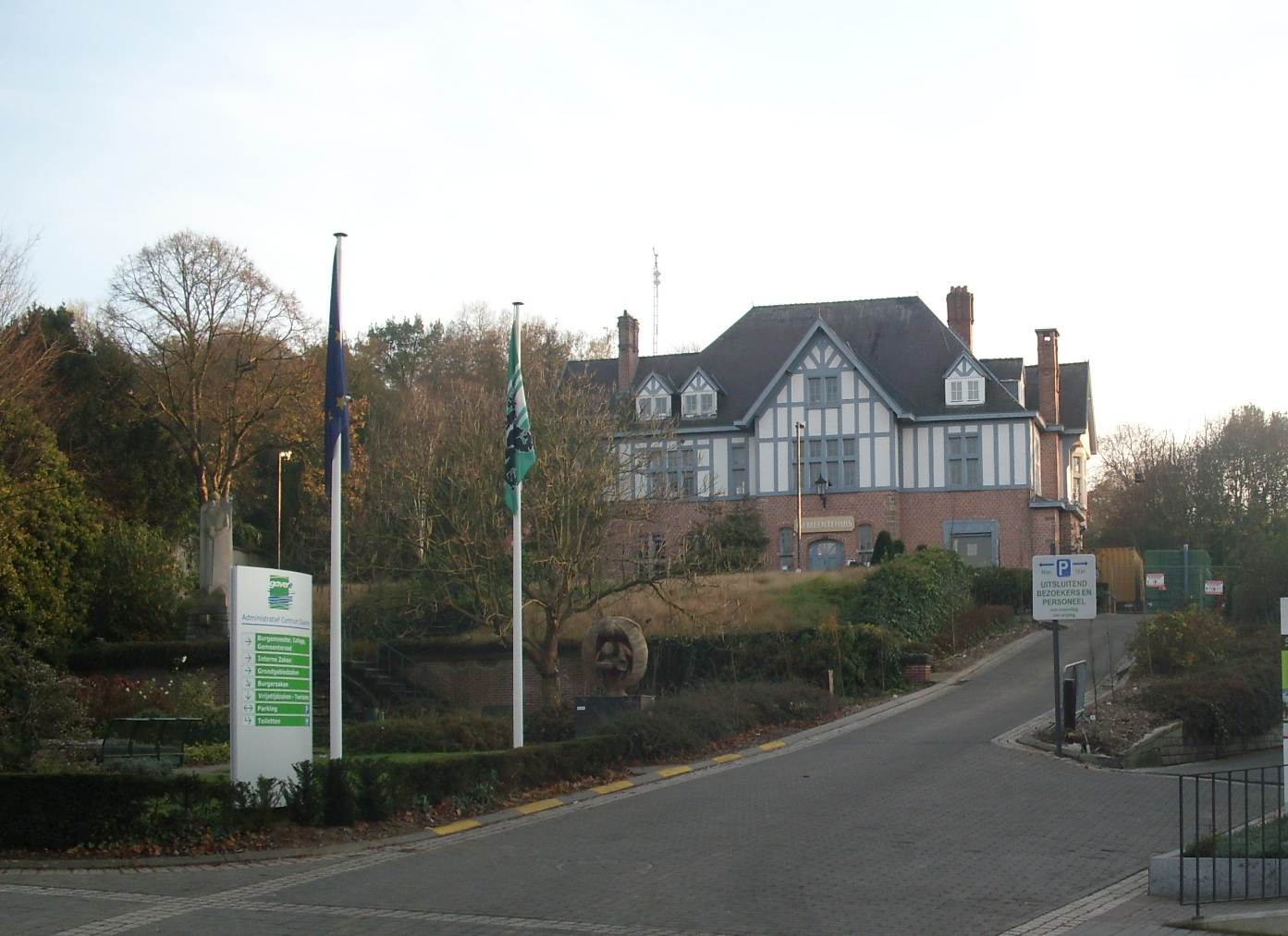 Gemeentehuis van Gavere - Markt 1 - Oost-Vlaanderen - België